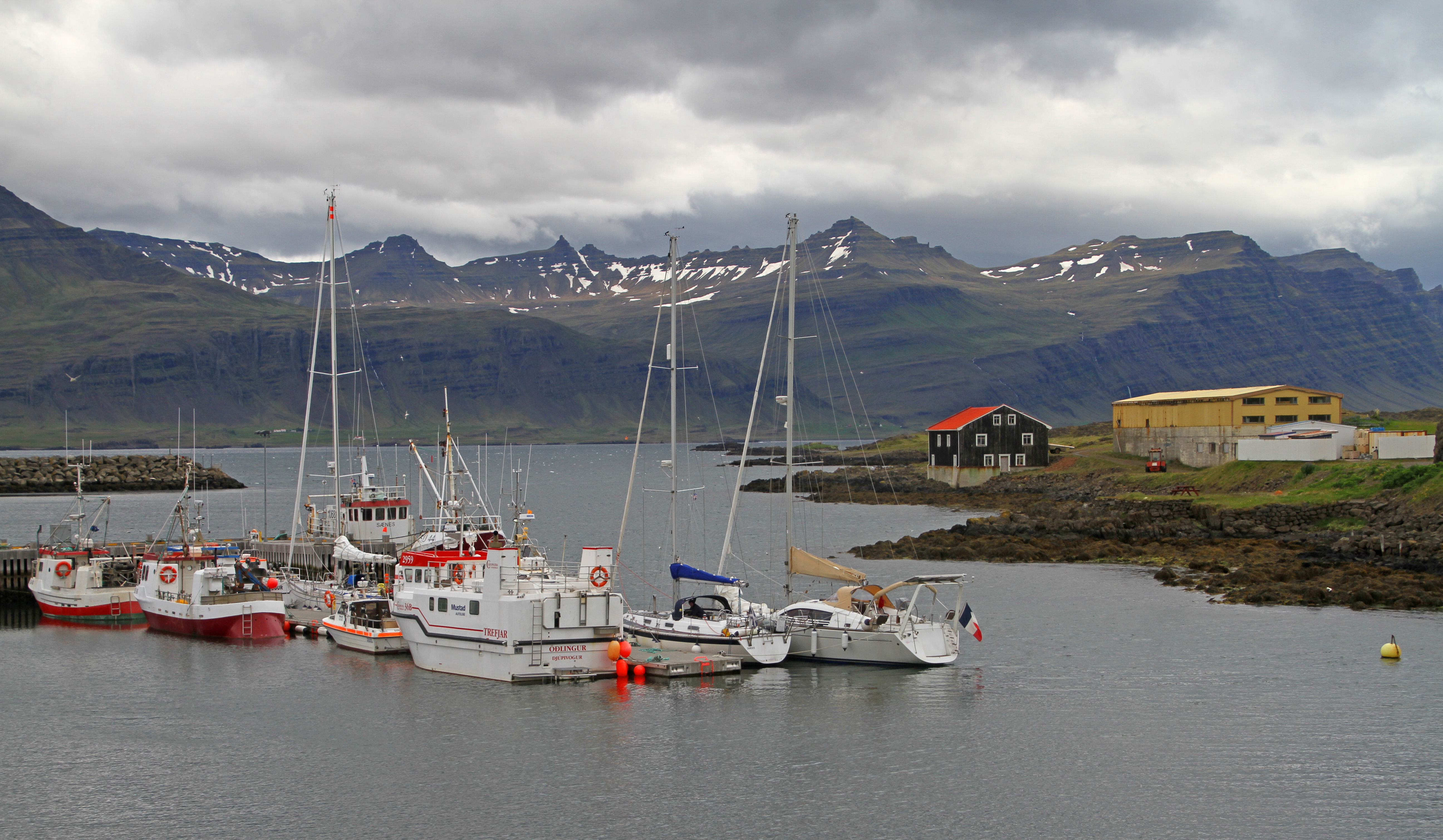 Djúpivogur in Island